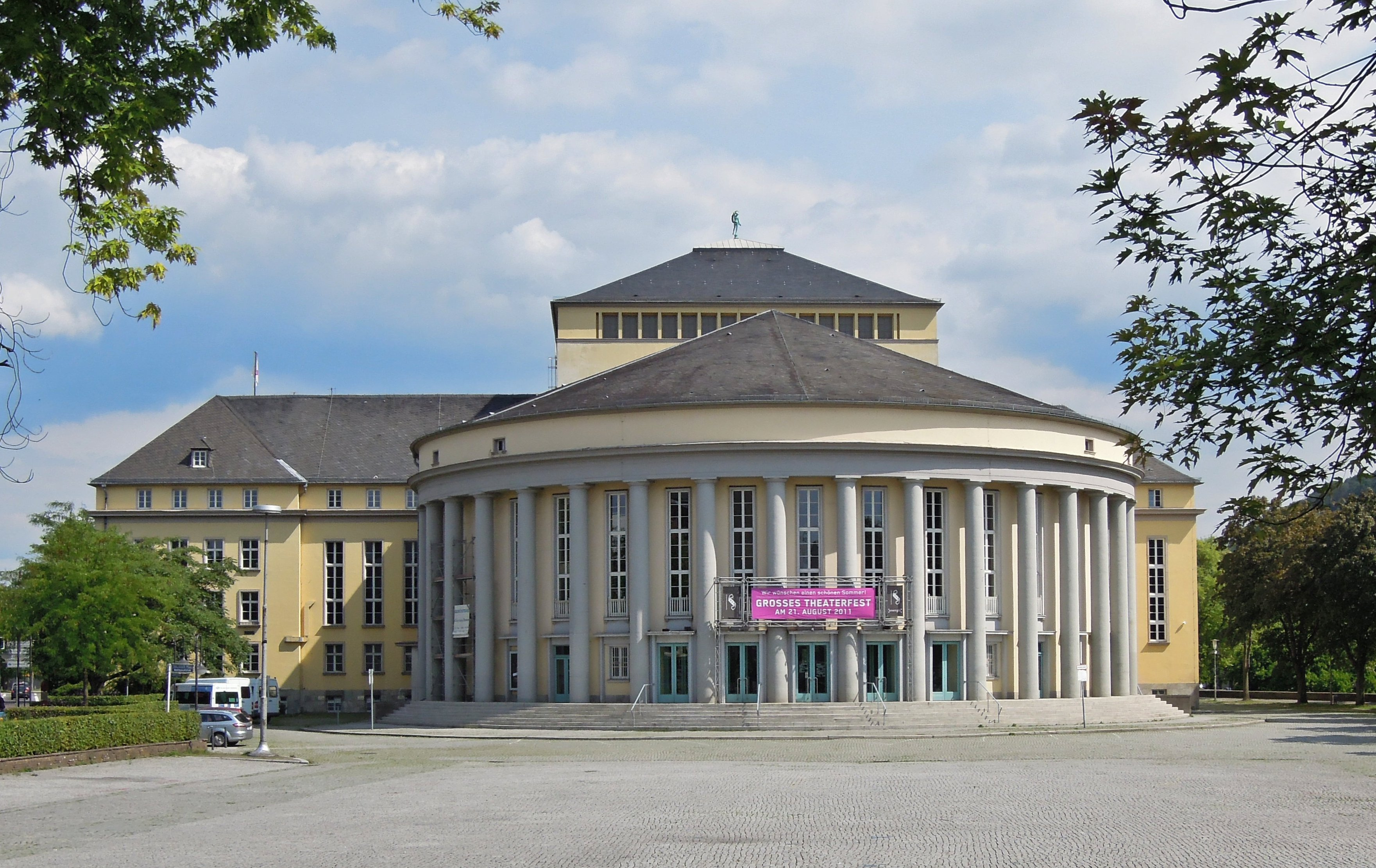 St. Vitus in Bad Schönborn